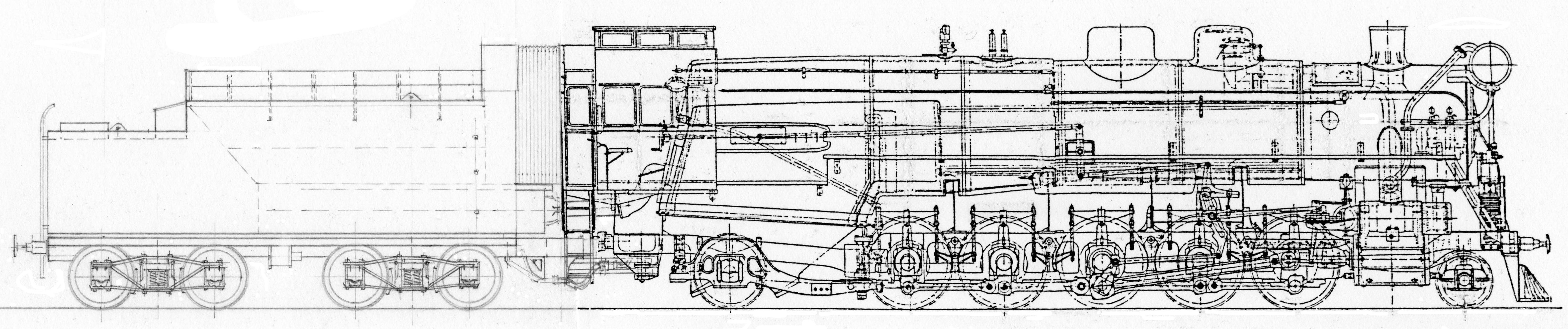 Схема паровоза типа 1-5-1, (2-5-2), серии ФД20-1, с временным тендером.